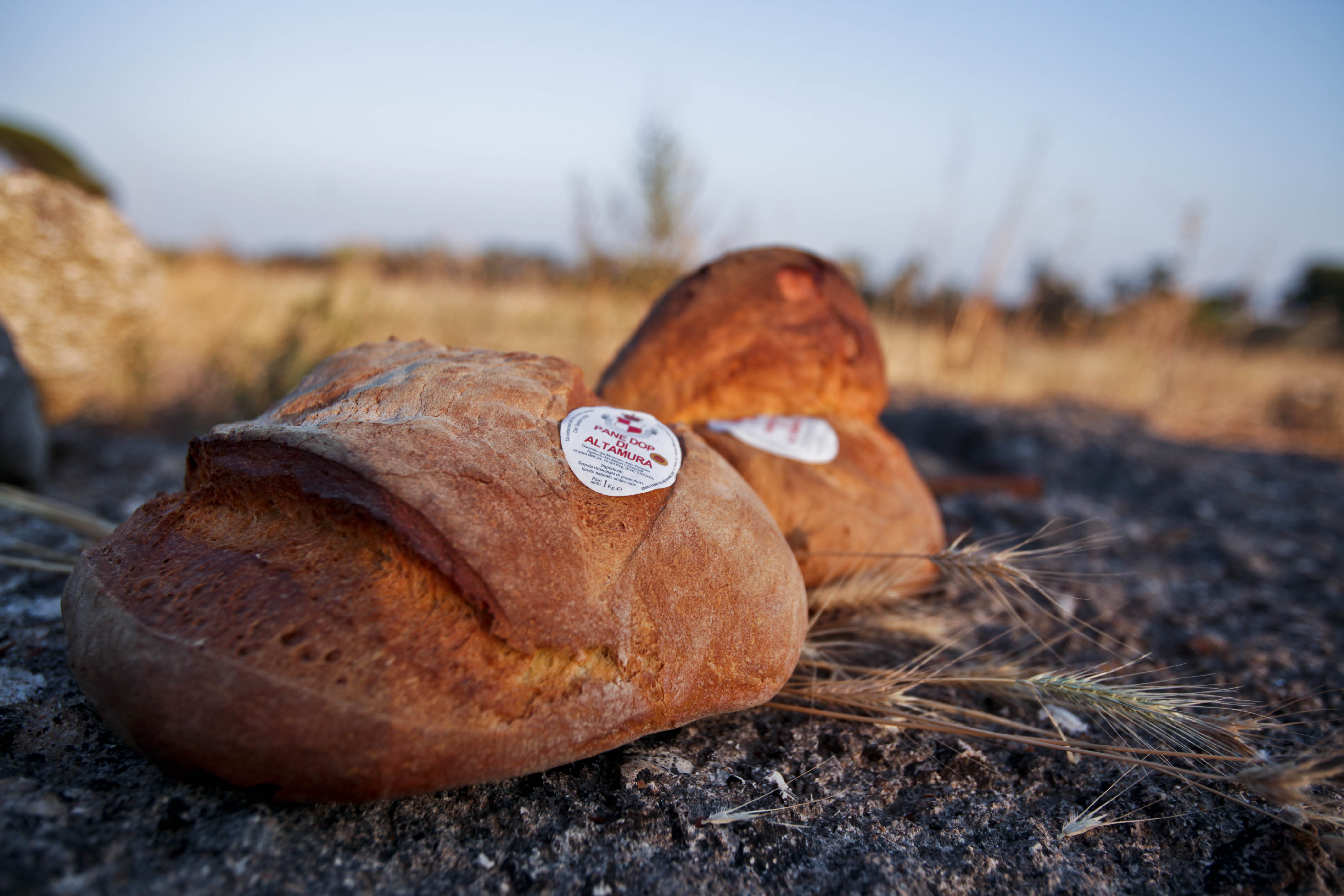 Panedi Altamura DOP